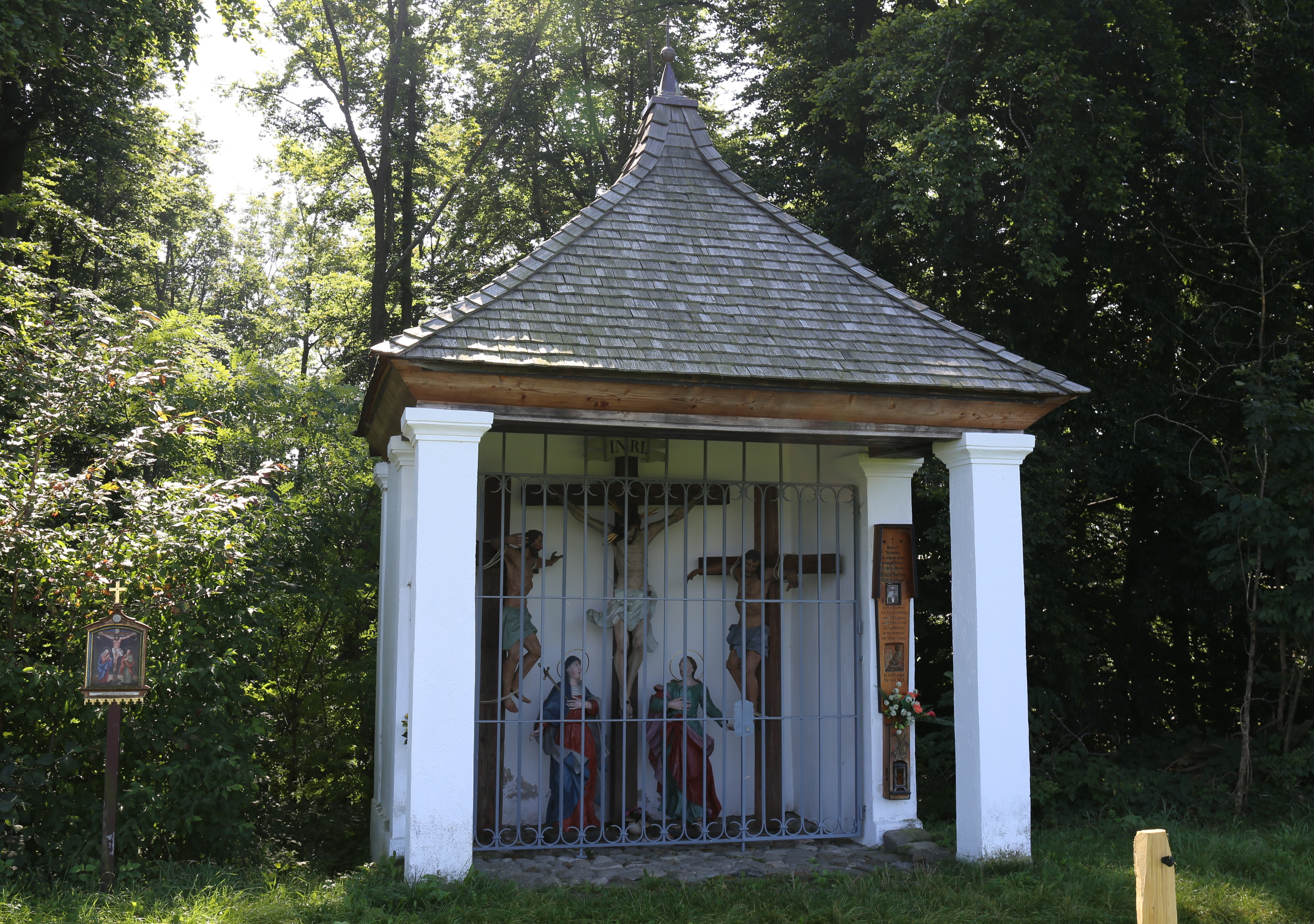 Mühlberg, Waging am See; Kalvarienbergkapelle, um 1765, mit Ausstattung; am Wallfahrtsweg von Waging nach Mühlberg